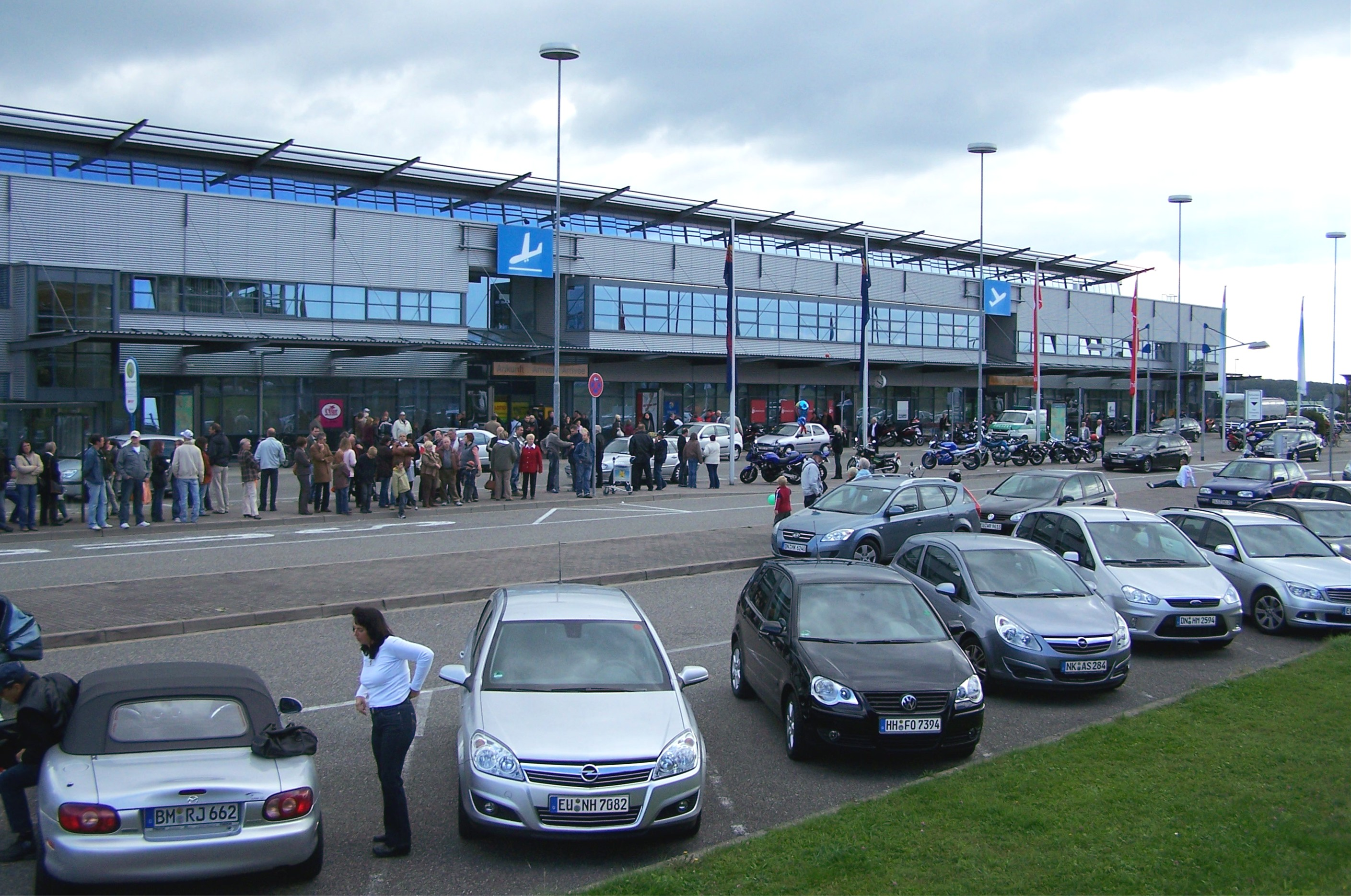 Terminal am Flughafen Saarbrücken